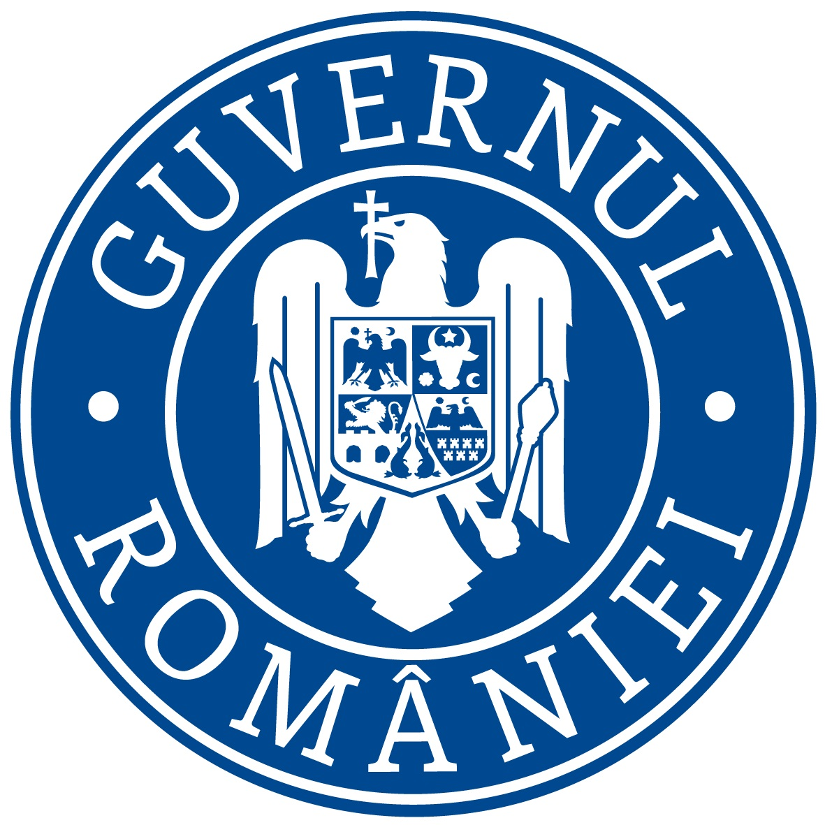 Sigla Guvernului României